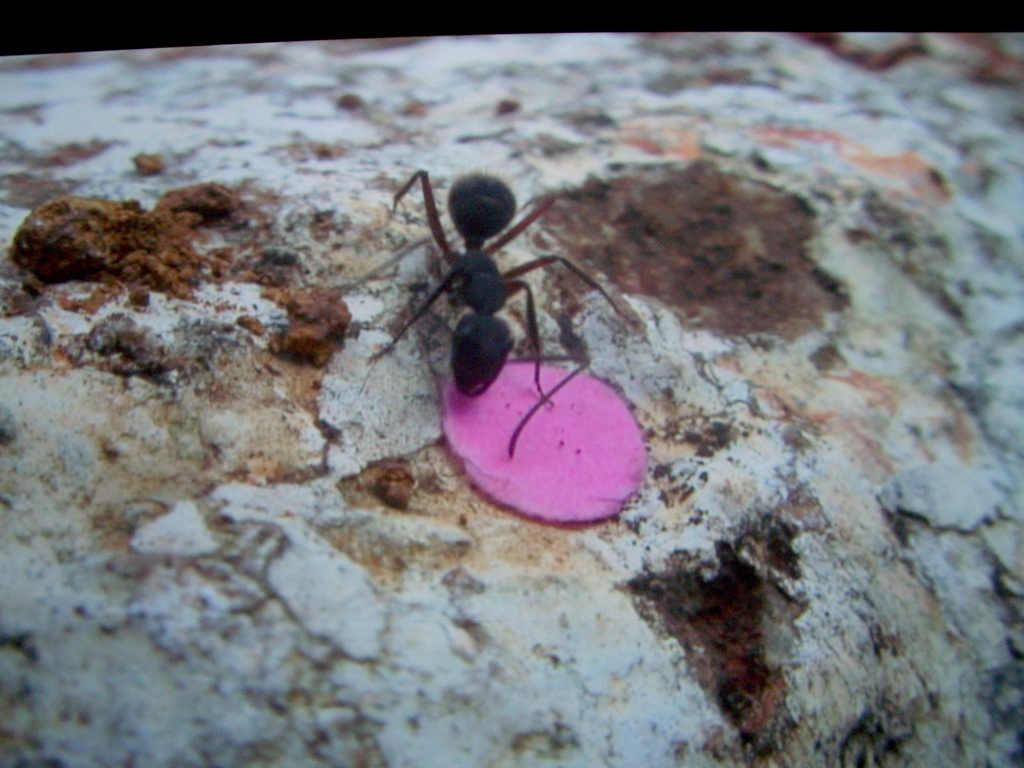 mieren die na het carnaval weglopen met confetti